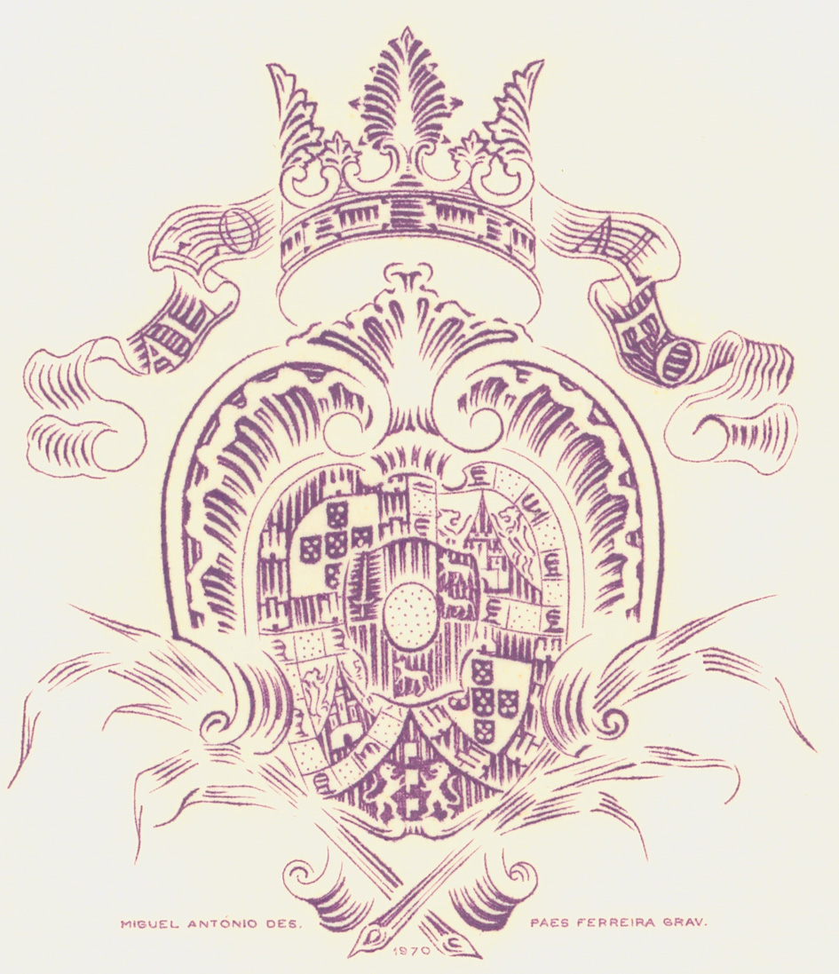 Ex-libris do Conde de Paraty, desenhou D. Miguel, gravou Paes Ferreira